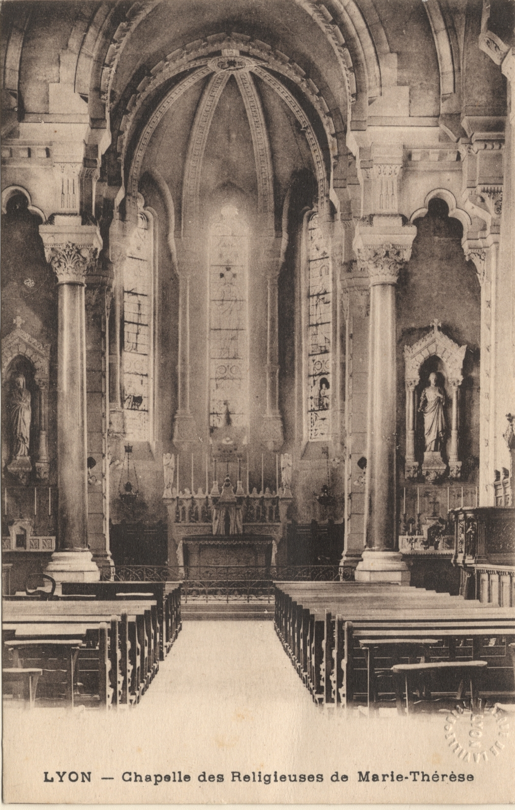 Intérieur de la chapelle des religieuses de Marie-Thérèse, au 61 montée du Chemin-Neuf